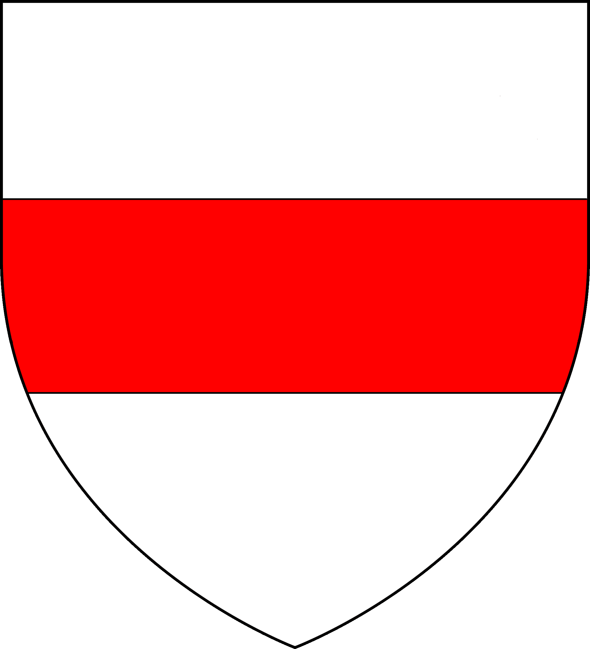 Blason de la Casa Sanseverino